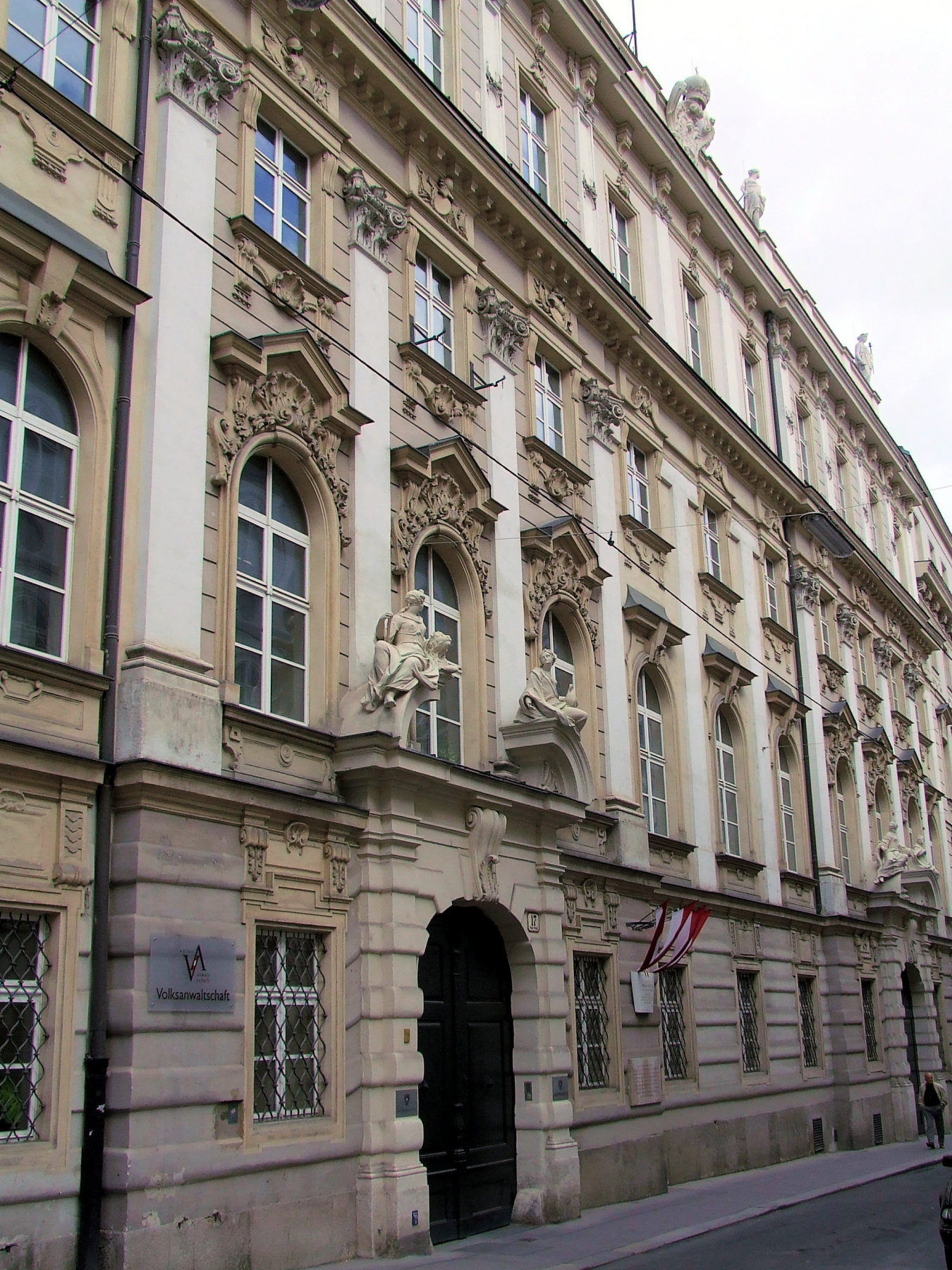 Palais Rottal im 1. Wiener Gemeindebezirk (Singerstraße 17 - 19/Grünangergasse 9).